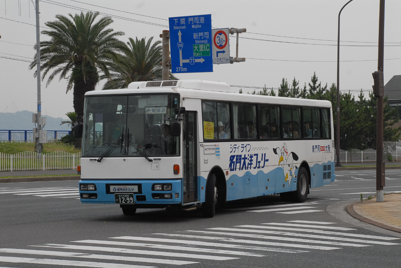 名門大洋フェリー送迎バス